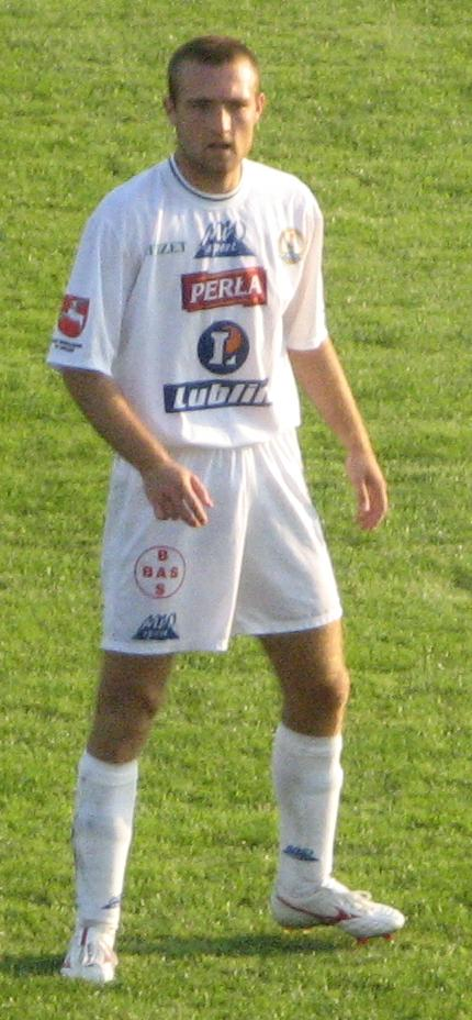 Piotr Prędota w trakcie występu w barwach Motoru Lublin